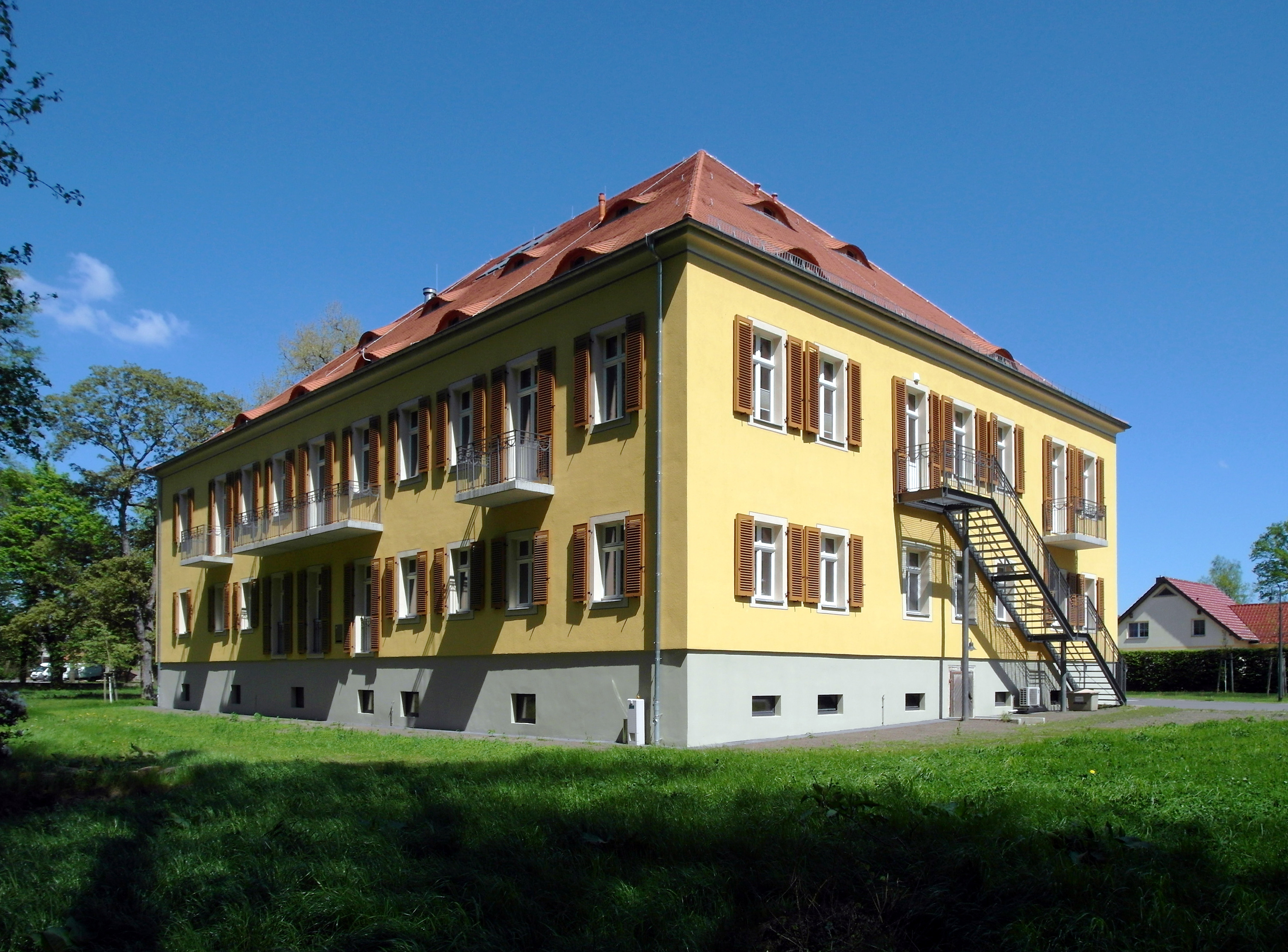 09.05.2016 02994 Bernsdorf /OL: Stadtverwaltung Bernsdorf, Rathausallee 2. Parkseite. Vermutlich stammt der Ortsname von einem Bernhard von Kamenz, der hier im 13. Jh. eine Wasserburg angelegt haben soll. Gangolf von Lüttichau erwarb 1534 die Gutsherrschaft. Nach mehrfachem Besitzerwechsel erwarb 1922 die Gemeinde Bernsdorf das Schloß (GMP: 51.374678,14.076412) vom letzen Gutsherrn, dem Großindustriellen Hugo Stinnes u- richtete es als Rathaus ein. [SAM5822.JPG]20150509610DR.JPG(c)Blobelt